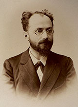 Václav Dobruský - český archeolog, epigrafik a numismatik